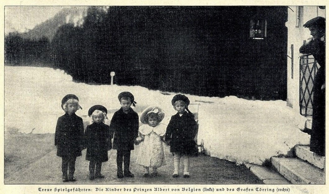 Die Kinder des Prinzen Albert von Belgien (links) und des Grafen Törring in Bad Kreuth, 1905